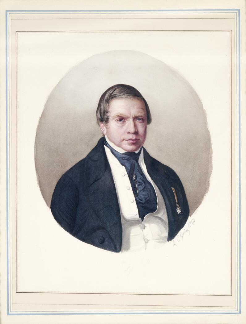 Paul Cesaire Garioz, Juan Grimaldi, gouache sobre papel agarbanzado, 340 x 260 mm, Madrid, Museo del Romanticismo. Procede del "Álbum original de Retratos Históricos de Doña María Cristina de Borbón", encargado a varios artistas por la reina gobernadora en su exilio en París, como reconocimiento de gratitud a sus leales.